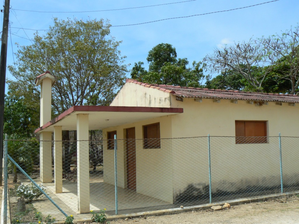 Vista general de la iglesia de Santa Gertrudis, Colón (Provincia de Matanzas, Cuba).